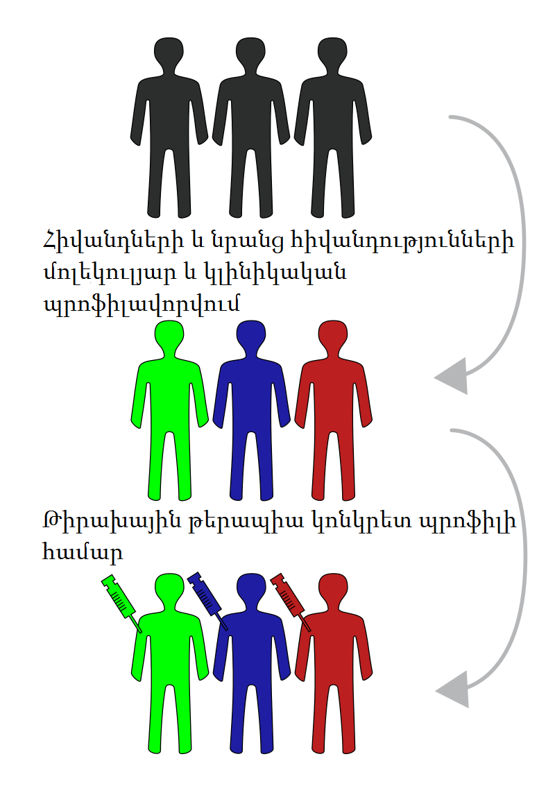 Հիվանդները և նրանց հիվանդությունները պրոֆիլավորվում են, կոնկրետ դեպքի համար բուժման ամենաէֆեկտիվ տարբերակը նույնականացնելու նպատակով